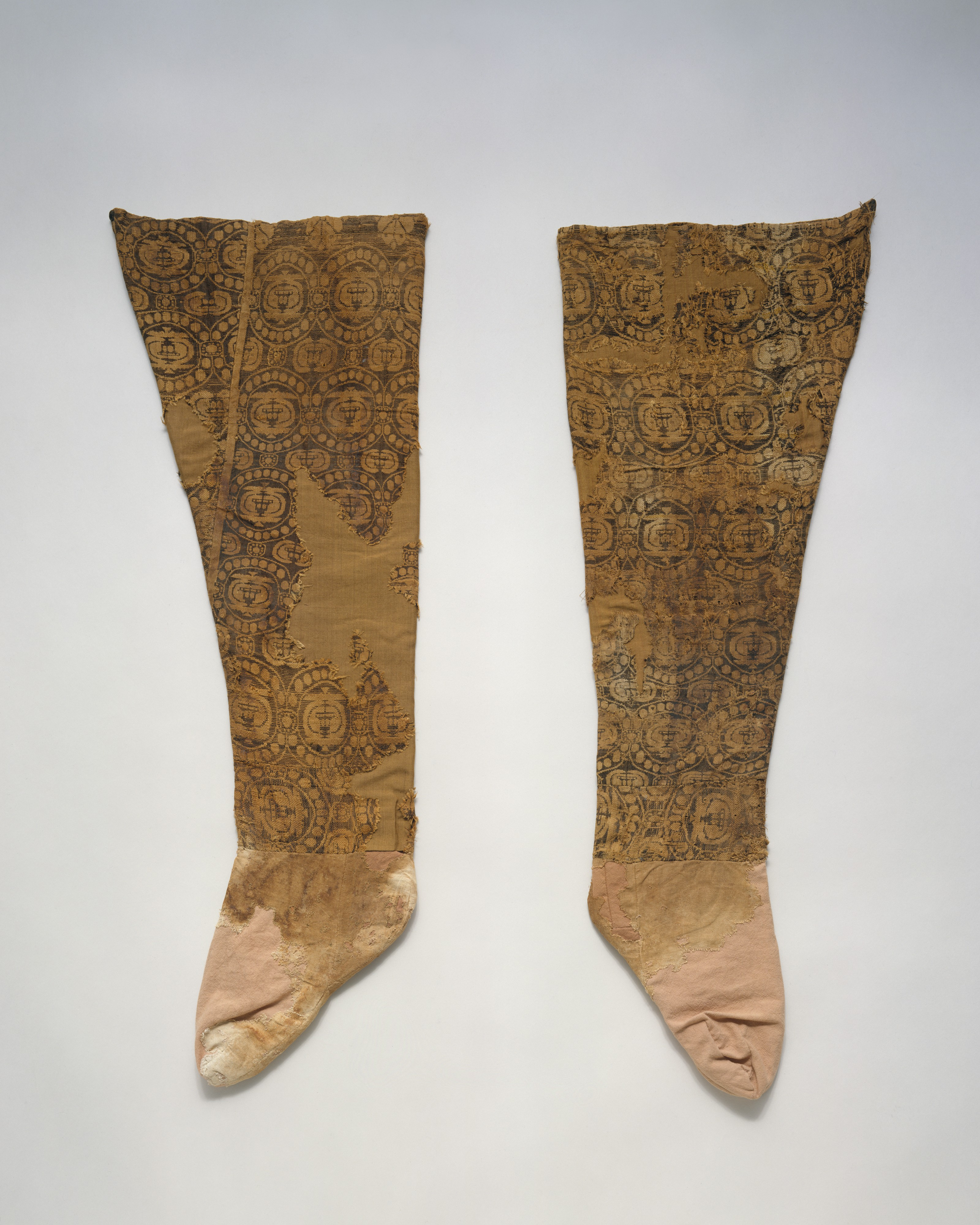 Textile; Textiles-Costumes